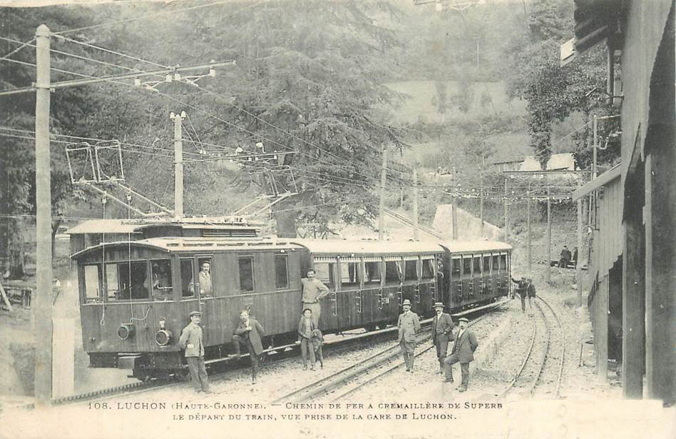 Ansichtskarte der Bergbahn Luchon–Superbagnères. Zug im Bahnhof von Luchon. Lok mit zwei Beistellwagen für zusammen 120 Fahrgäste. Hersteller der Lok: SLM (mechanischer Teil) und BBC (elektrischer Teil).